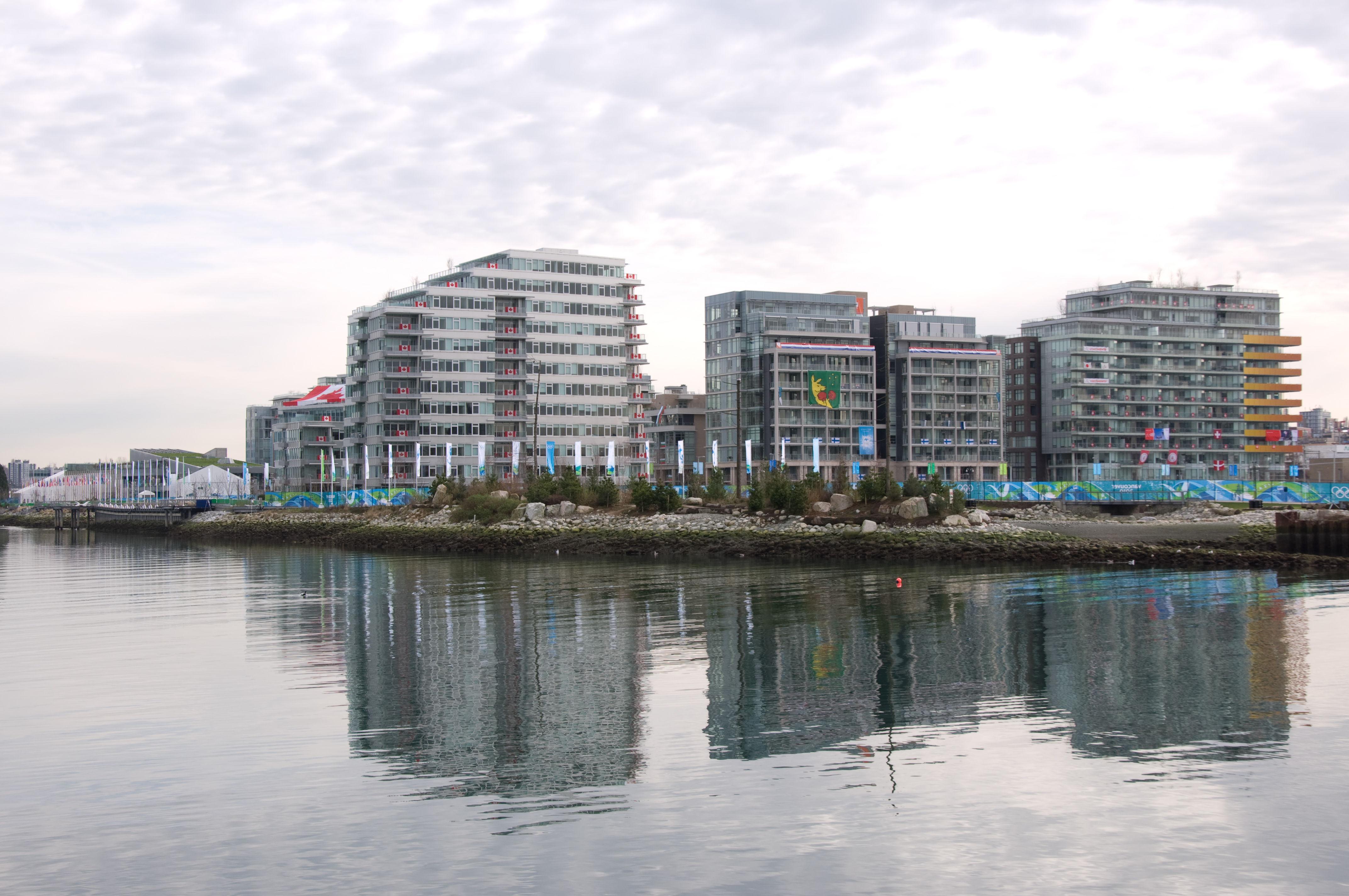 Athletes Village, Vancouver 2010